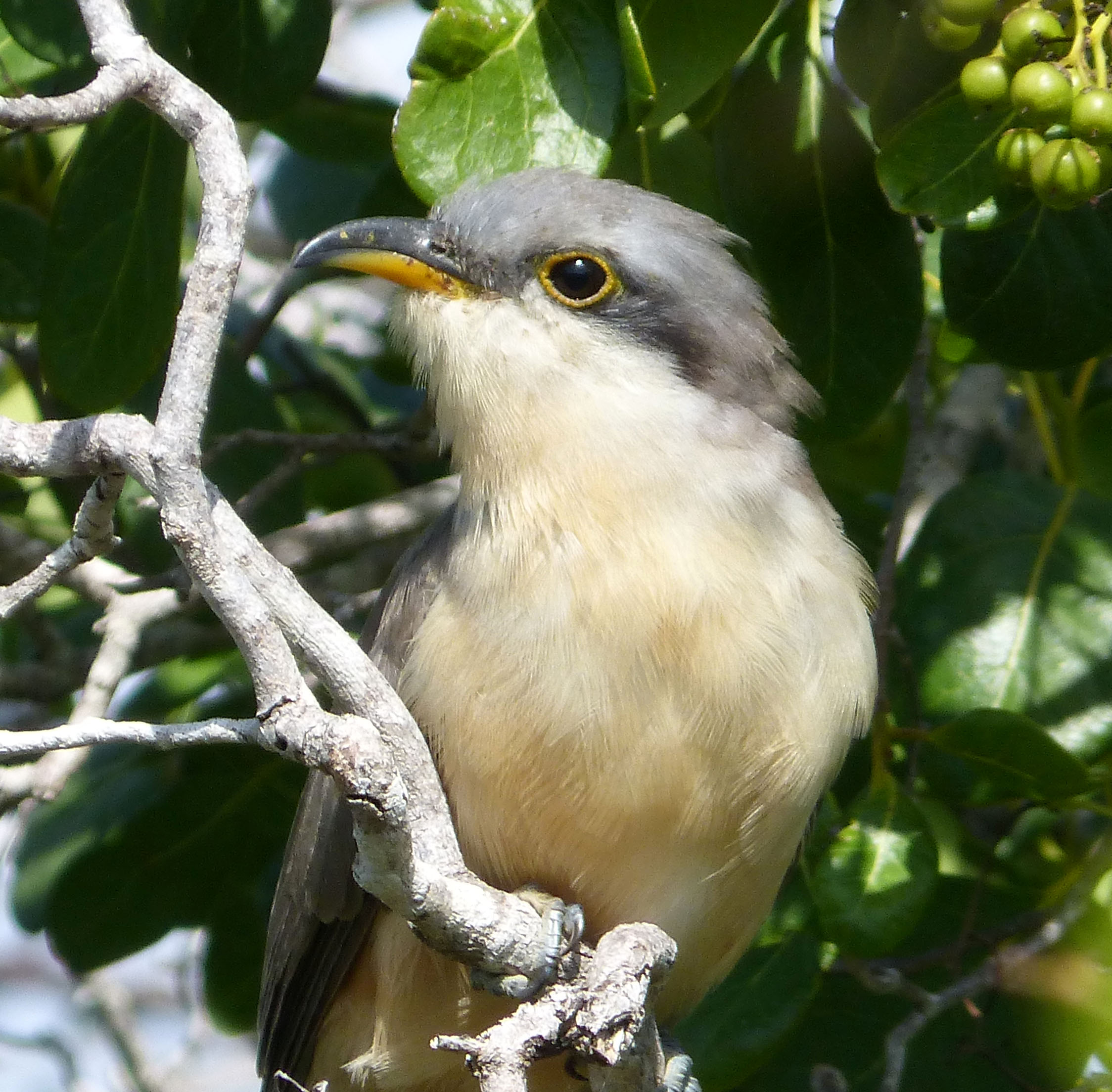 Cayo Coco, Cuba